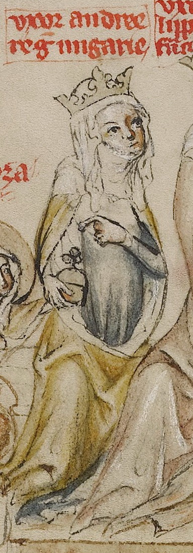 Gertruda Meránská